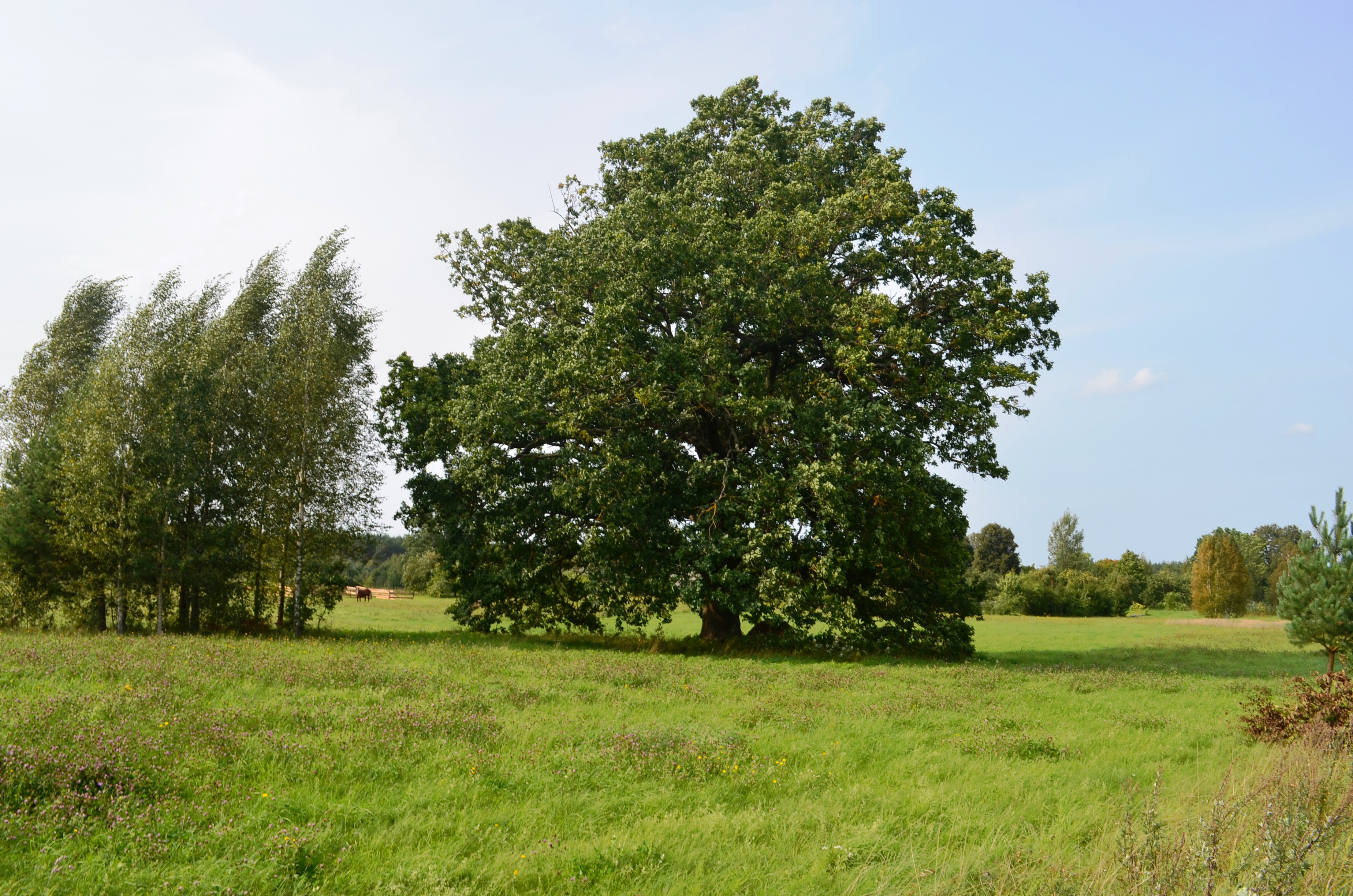 Senas ąžuolas, Linkos, Mickūnų sen., Vilniaus raj.